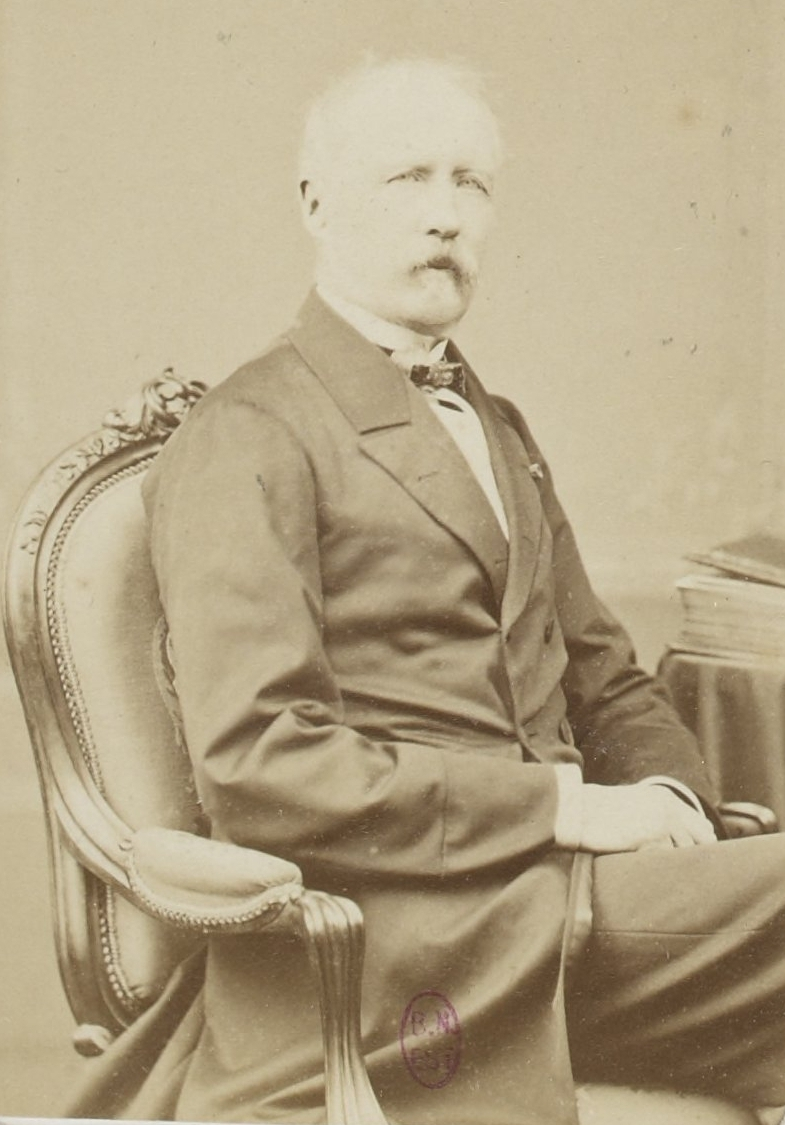 Personnalités françaises et étrangères sous le Second Empire.